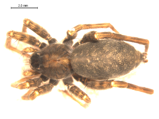 Pardosa lapidicina